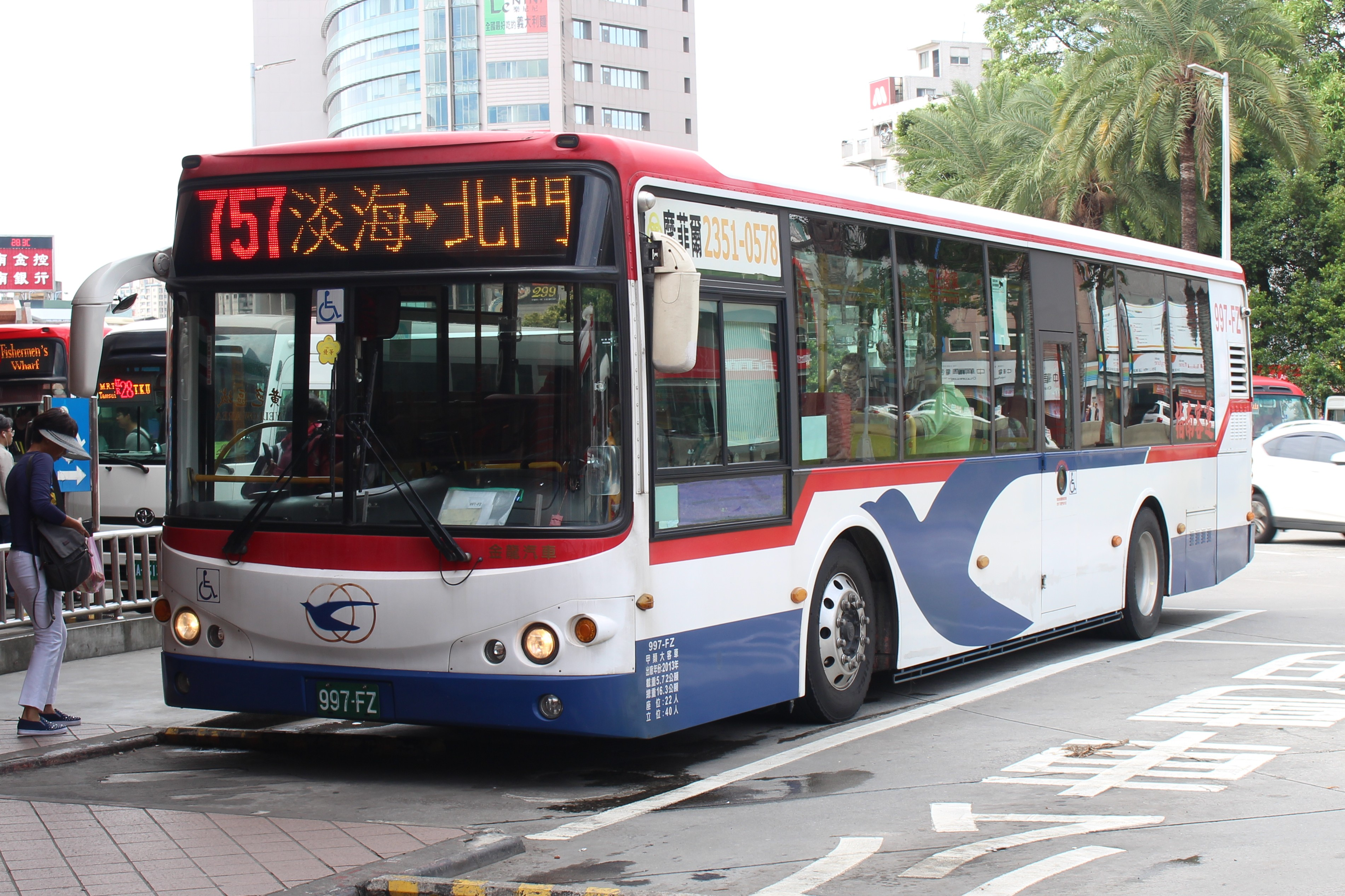 指南客運 2013 KINGLONG KL6112U1 997-FZ 757